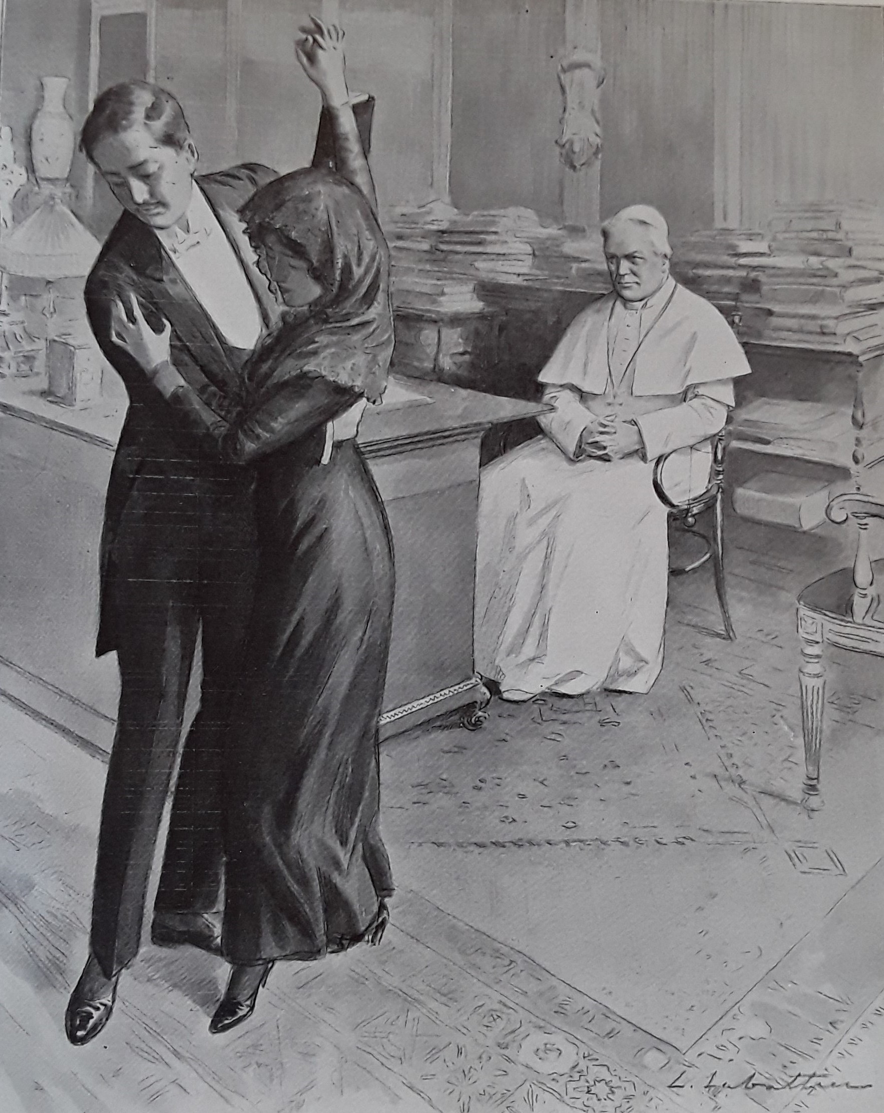 Dos jóvenes de la aristocracia bailando el tango en presencia de Pío X. Posiblemente, el episodio fue inventado por el periodista francés Jean Carrère, en aquel tiempo corresponsal de Le Temps en Italia.[1]